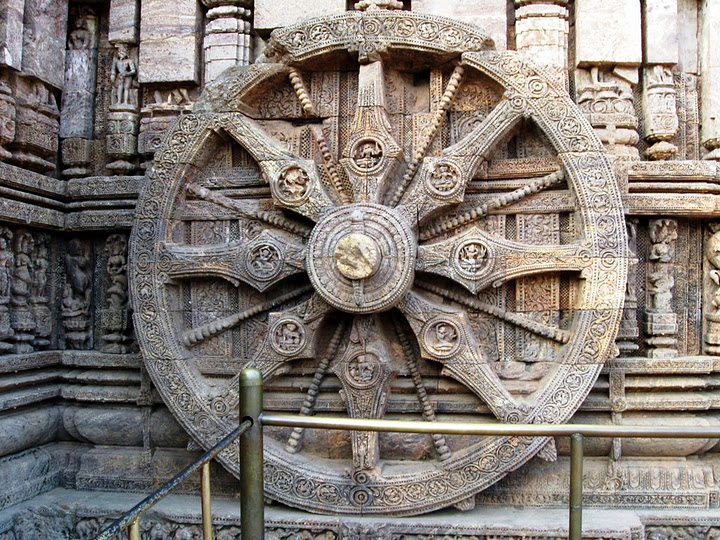 ஒடிய மாநிலம் புவனேஸ்வரத்திற்கருகிலுள்ள கோனாரக் சூரியனார் கோயிலில் உள்ள சூரியத் தேரின் சக்கரத்தில் ஒன்று.